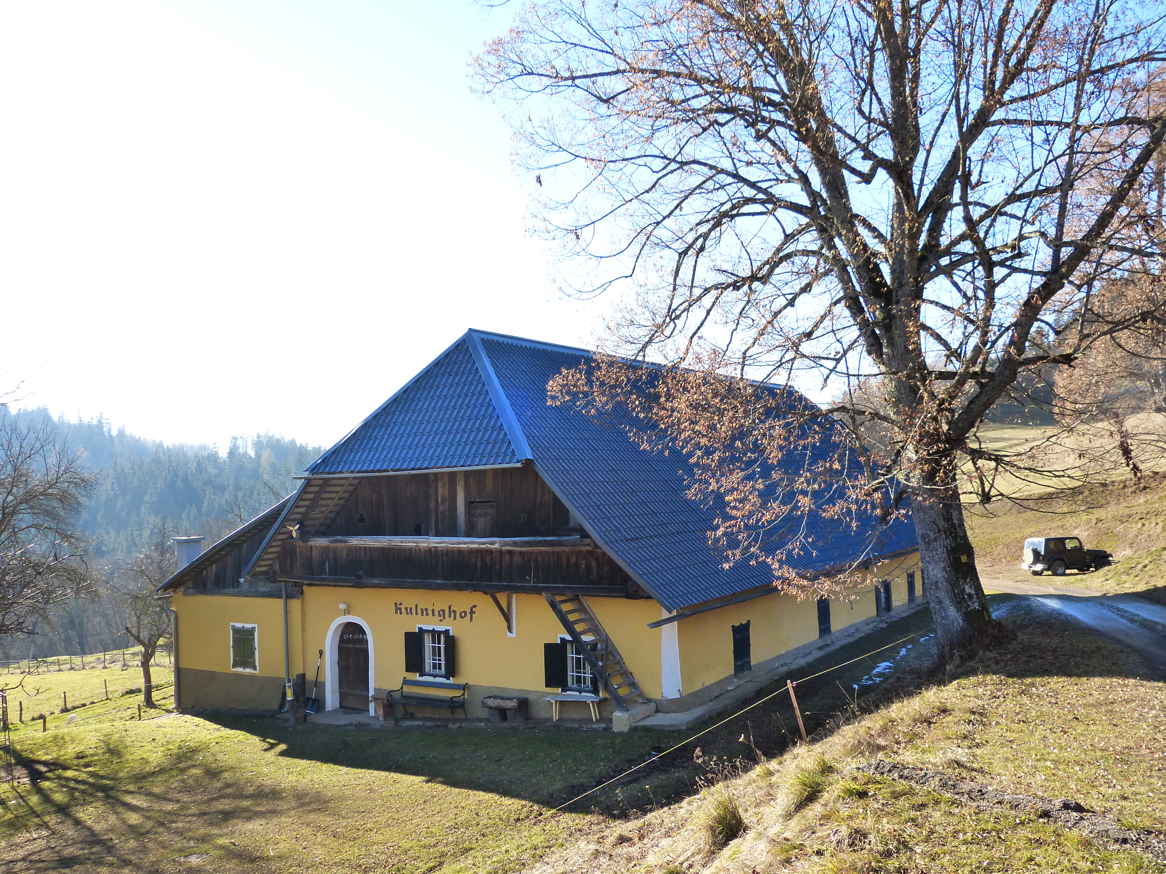 Kulnighof, Christofberg (Gemeinde Brückl, Kärnten): Bauernhaus. Im Dehio Kärnten 2001, S.66, als "für die Ausläufer der Saualpe typisches Winkelhaus" erwähnt; Längslaubenhaus. gut erhaltener Bauernhof; Das Dach wurde 2015 nach einem starken Hagelunwetter renovierte.